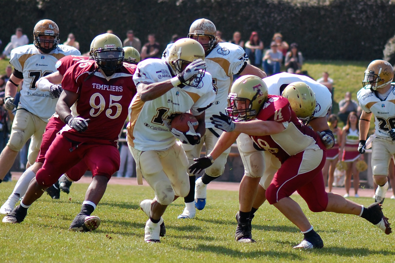 Match de l'European Football League 2010 Templiers d'Elancourt - Bergamo Lions, le 18 avril 2010 à Elancourt